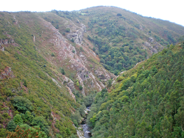 Imagen de las hoces del Esva, en el Valle de Paredes